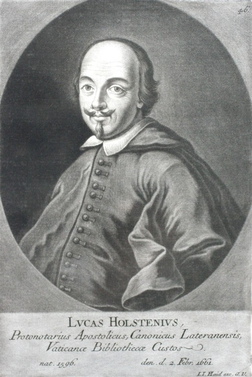 Lucas Holstenius (1596-1661), Humanist, Prälat